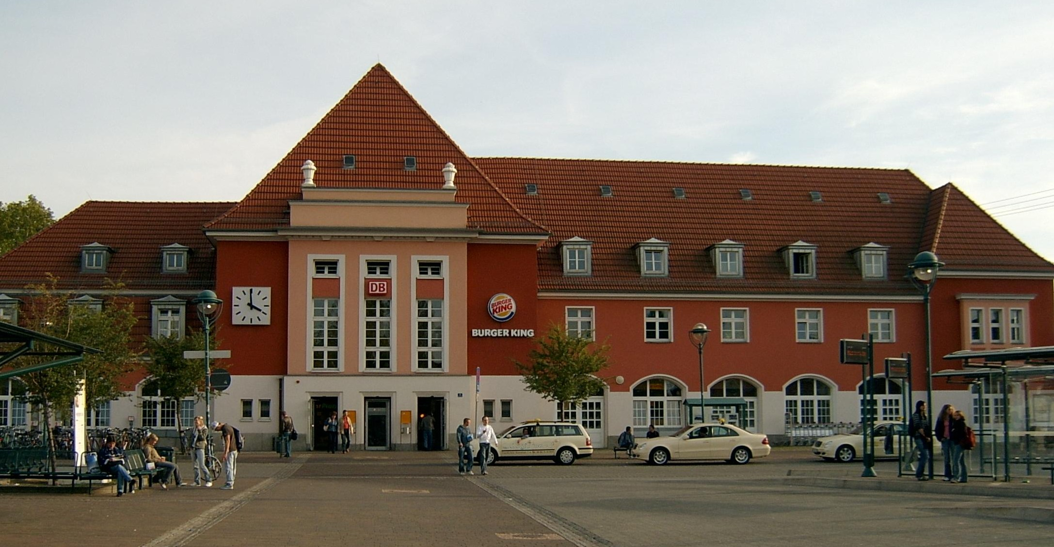 Bahnhof in Frankfurt (Oder).